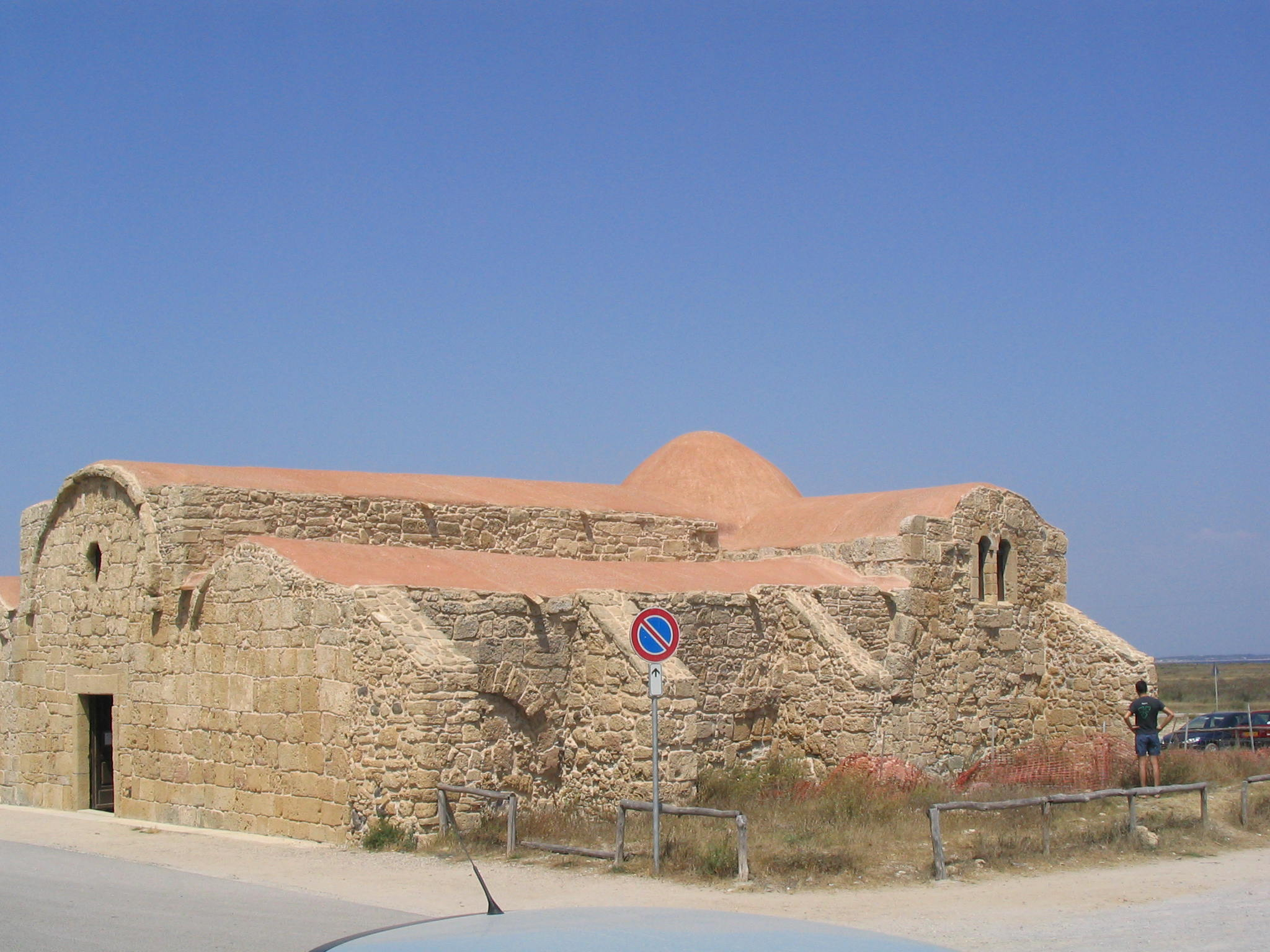 Església romànica de San Giovanni di Sinis. Sardenya